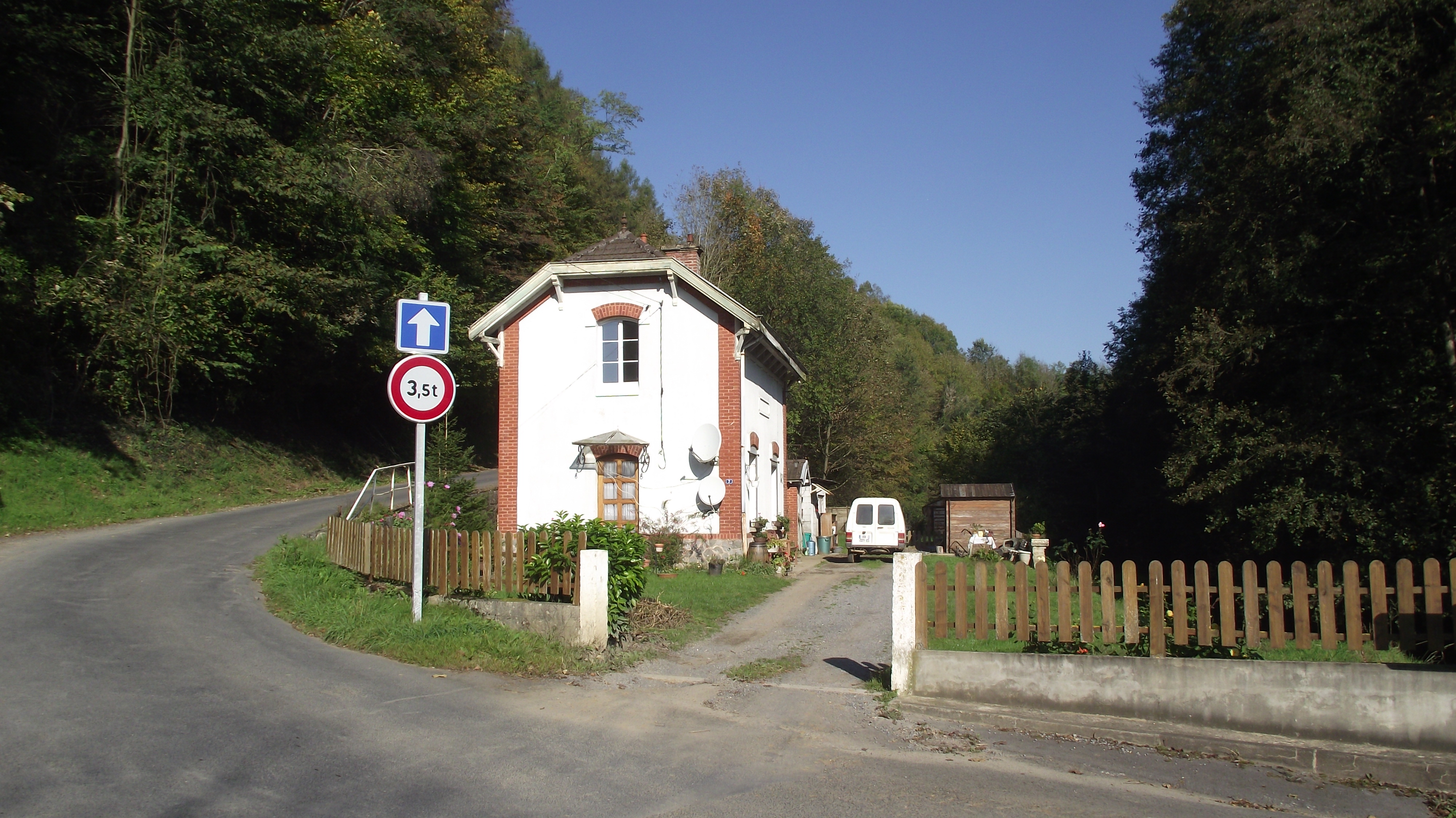 Daigny stationsgebouw van de vroegere CFDA meterspoorlijn Sedan - Corbion